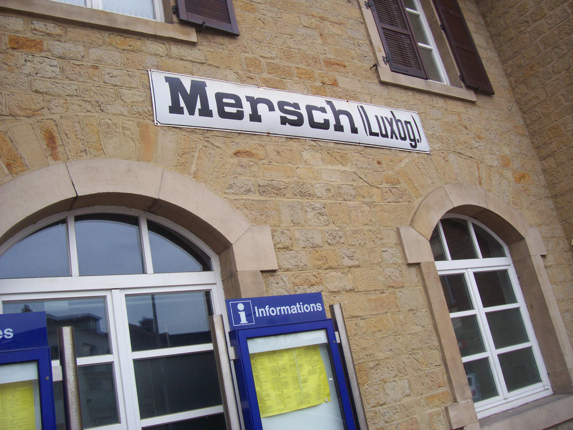 Mersch Bahnhof Vorderseite